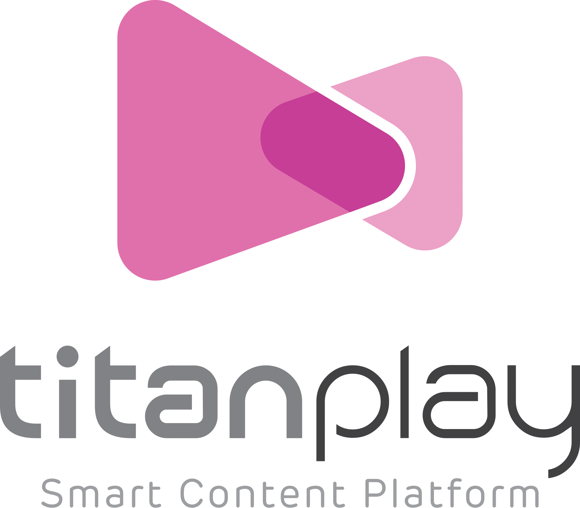 스마트 콘텐츠 플랫폼 TiTAN Play